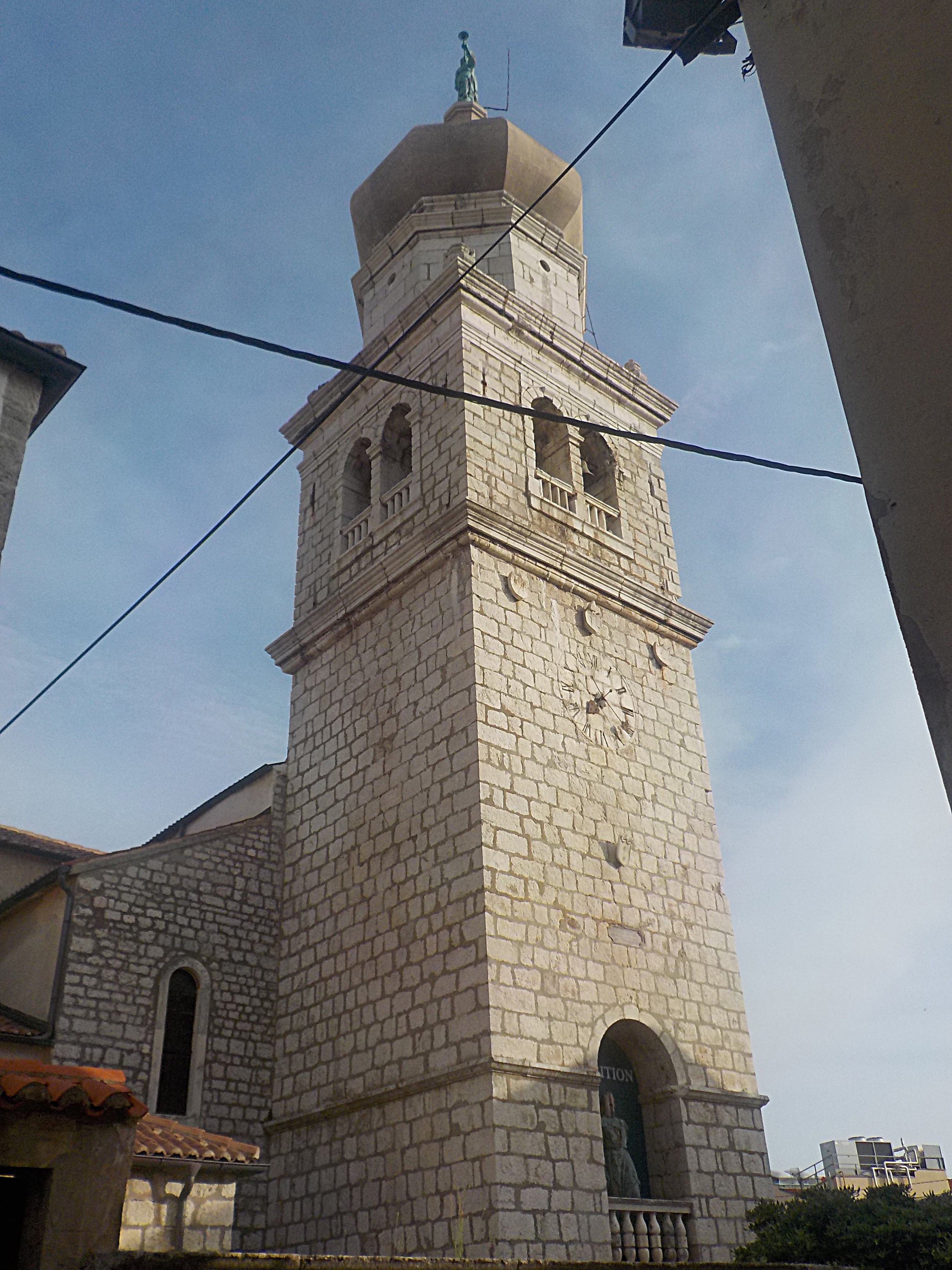 Kroatien Kathedrale von Krk - Außenansicht - Turm